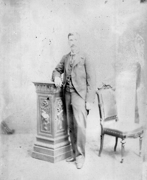 Político, hacendado y comerciante peruano, Que enfrentó la invasión chilena en la Provincia de Pacasmayo y FUE UN Participante activo de la Revolución de Pierola.